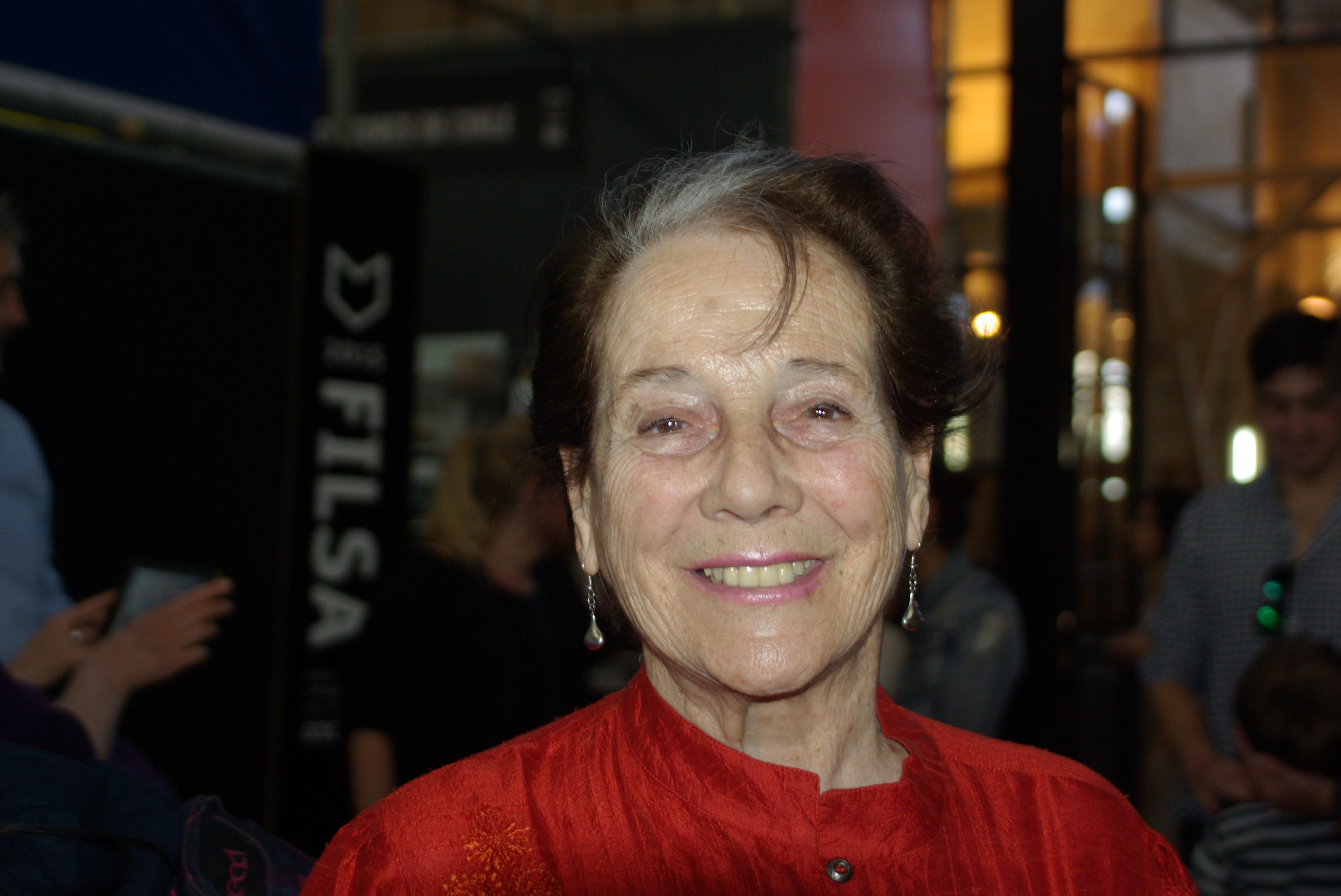 La escritora chilena Mónica Echeverría en la Feria Internacional del Libro de Santiago 2015